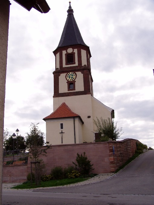 Katholische Pfarrkirche St. Wenzeslaus Theilenberg